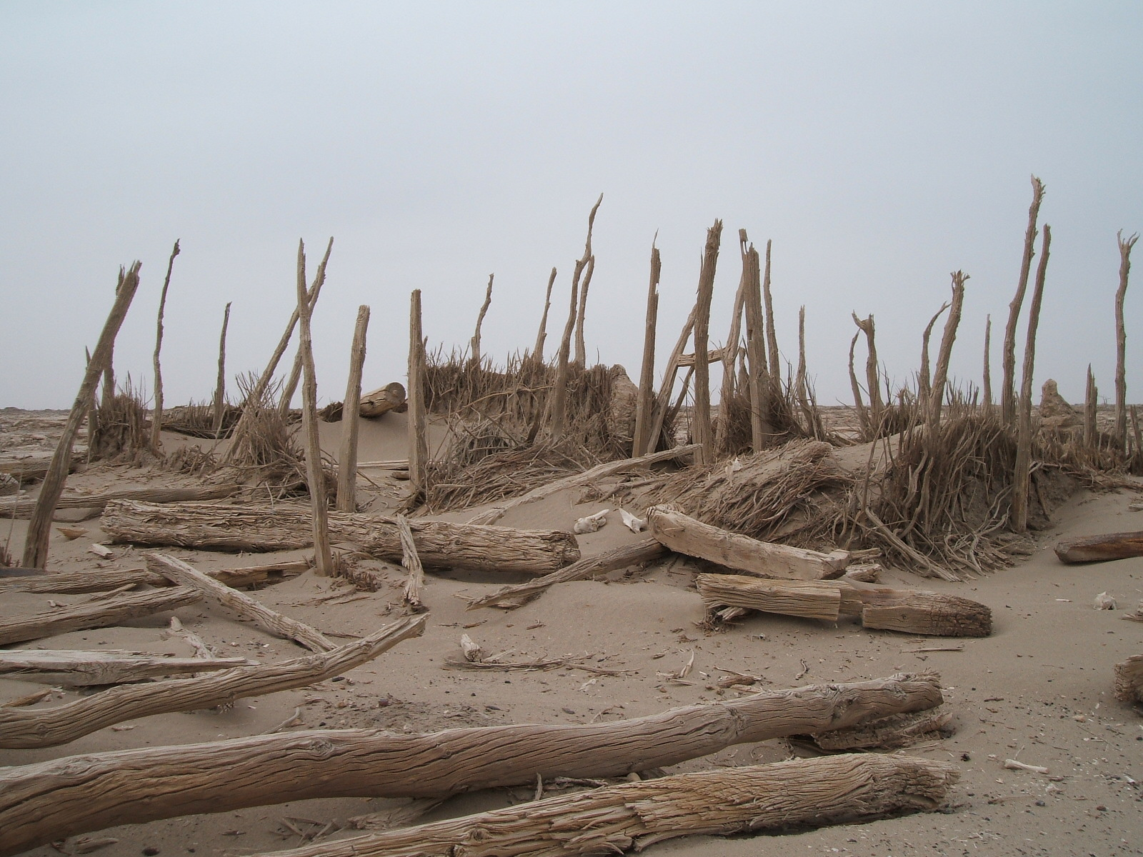 楼兰古城 Loulan city China Xinjiang Urumqi Welcome you to tour the, Китай Синьцзяна Урумчи приветствовать Вас на экскурсию, الصين ترحب زيارتك لاورومتشى فى شينجيانغ, 中国新疆のウルムチへの訪問を歓迎する, 中国新疆乌鲁木齐欢迎您来观光旅游